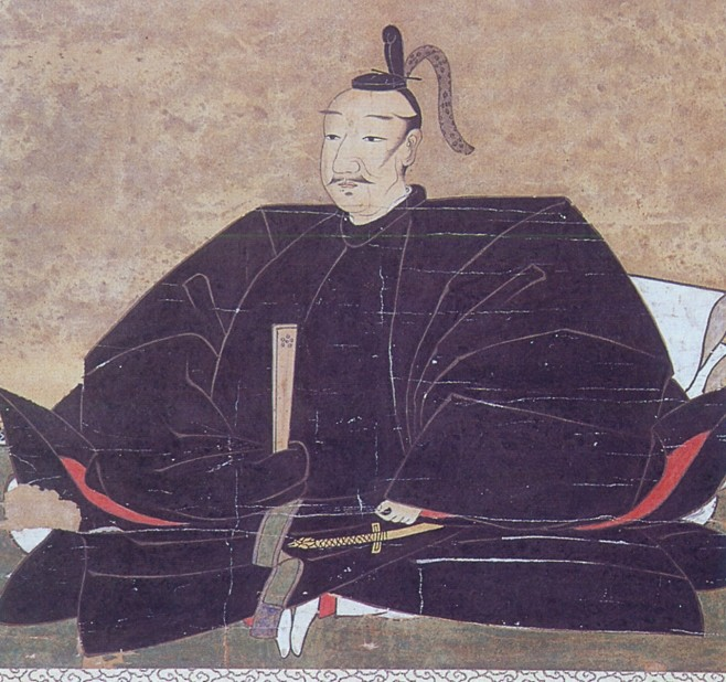 蒲生氏郷。Gamo Ujisato.